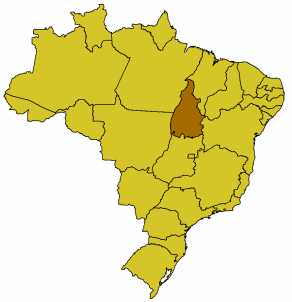 Karte Brasiliens, Tocantins hervorgehoben, GFDL nach der Vorlage Bild:Brasilien Bundesstaaten.png